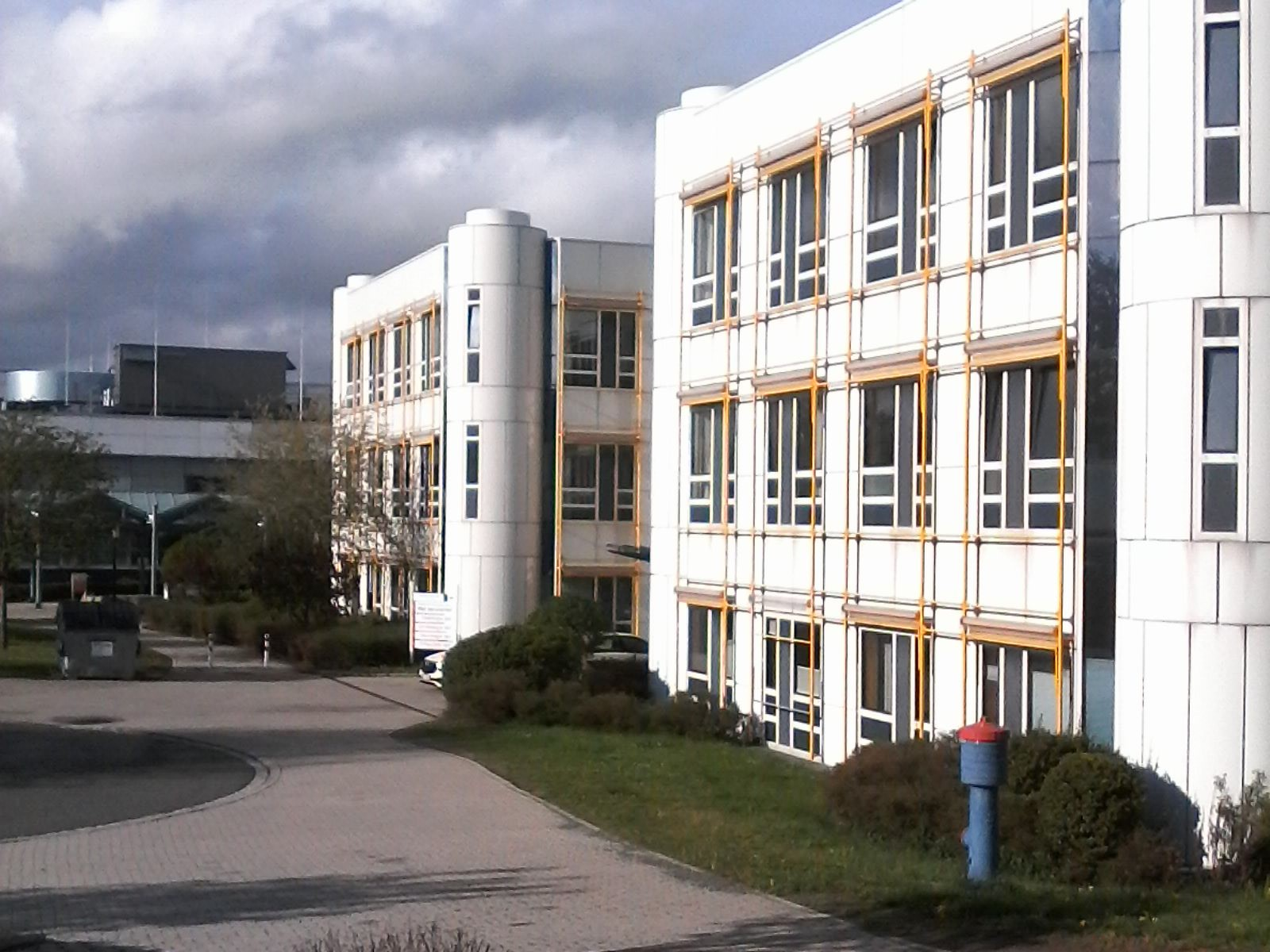 Das Sana Klinikum in Hof in der Eppenreuther Straße